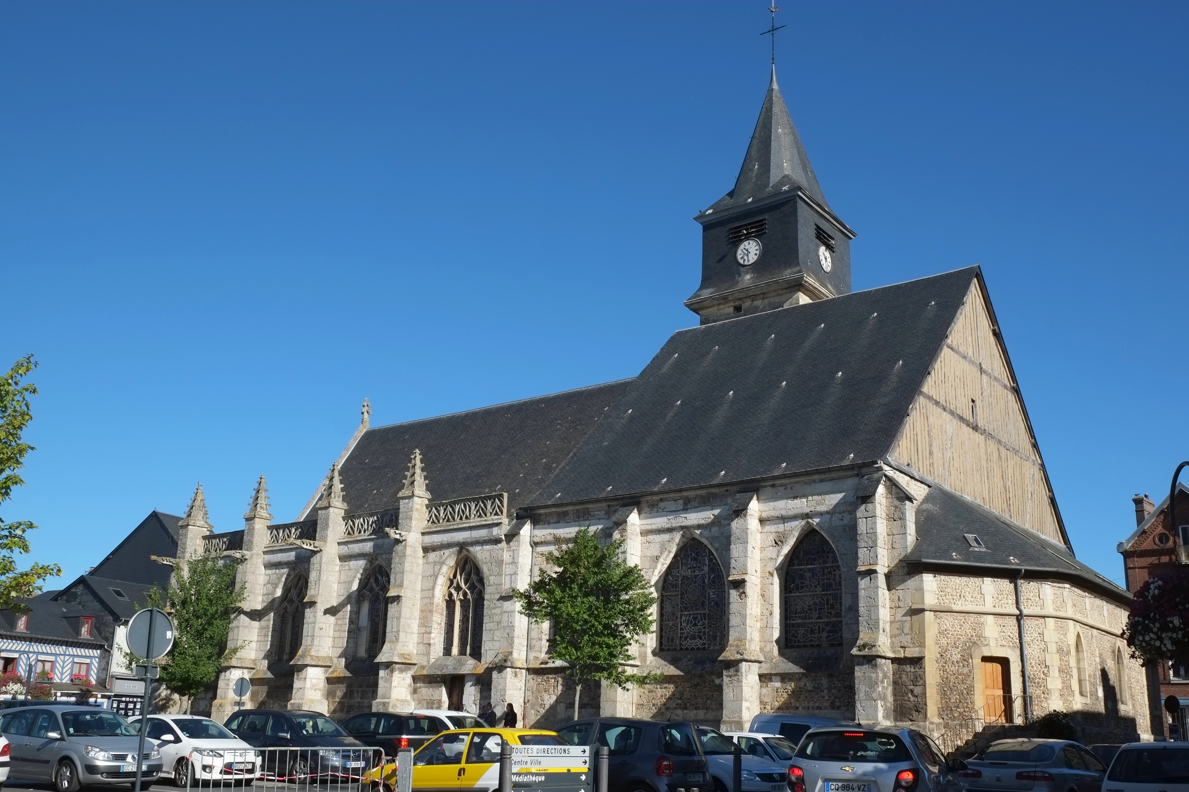 Kirche Saint-Helier in Beuzeville in der Normandie